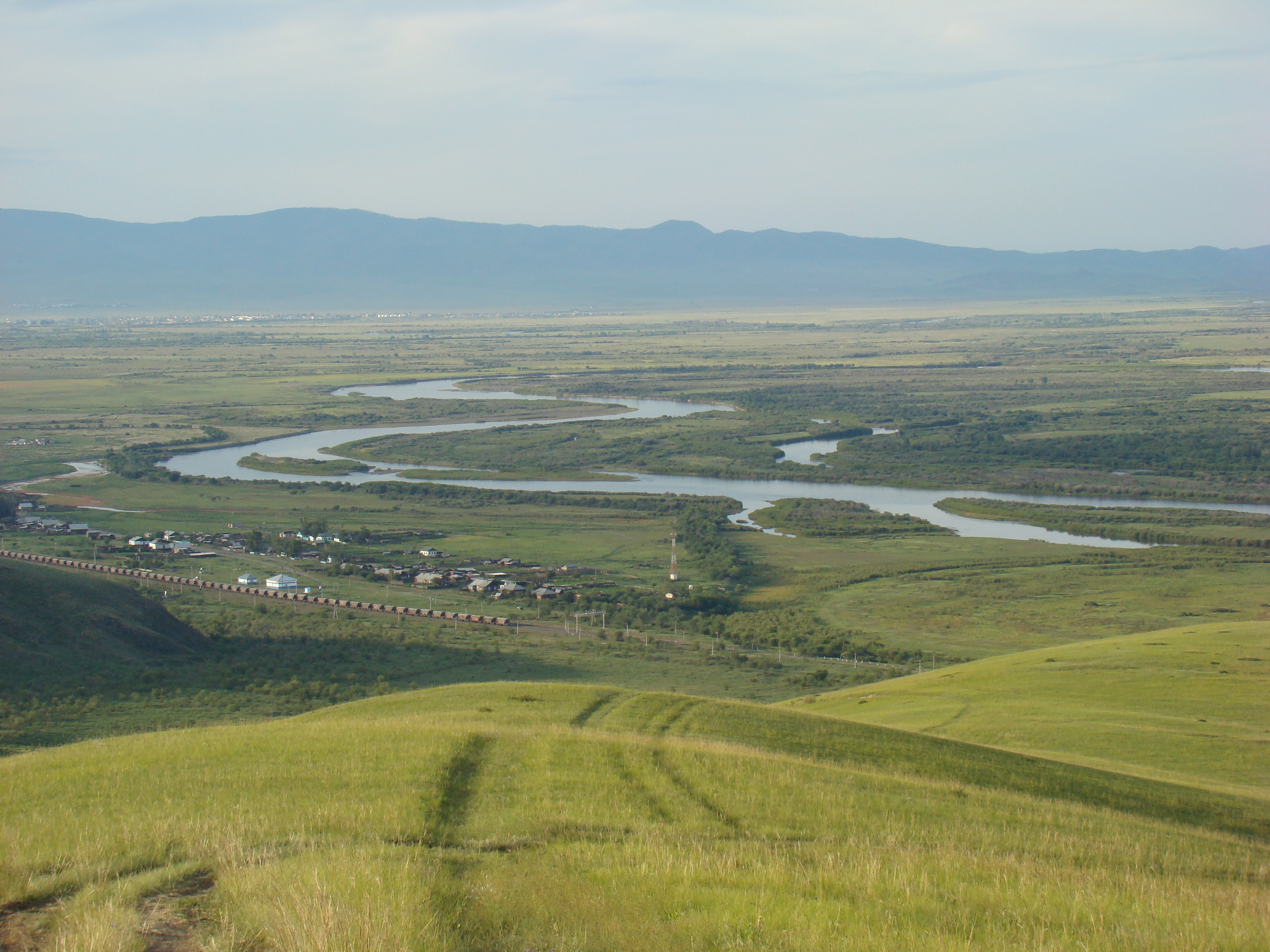 Река Селенга - кормилица села Зарубино